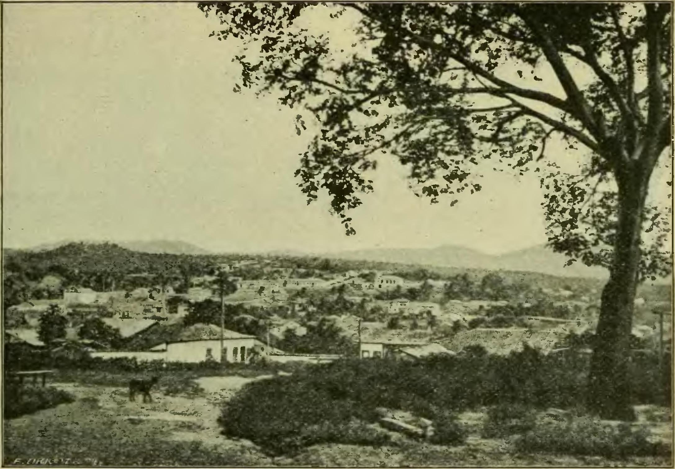 antiga cidade de Goyaz, atual Goiás